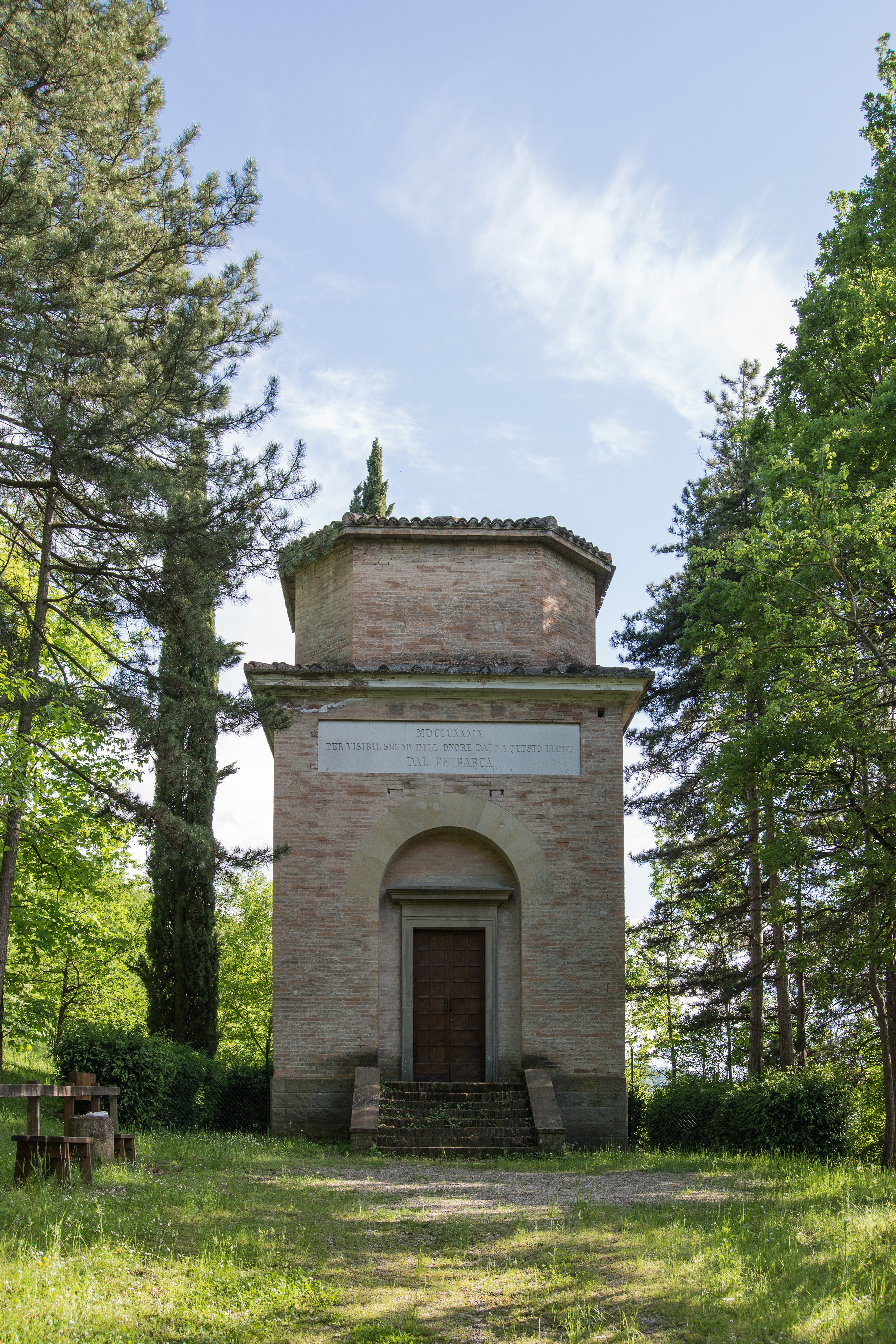 Tempietto del Petrarca - Canossa, Reggio Emilia, Italia